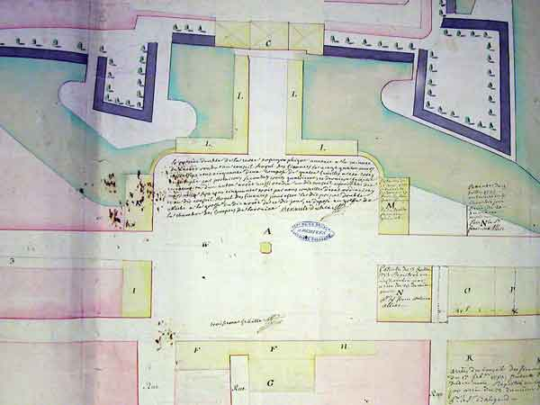 Plan annexé à la minute de l’arrêt du Conseil royal des Finances du 24 mars 1752. Il indique la partie méridionale des fortifications de la Vieille-Ville et les emplacements des constructions de la place Royale.